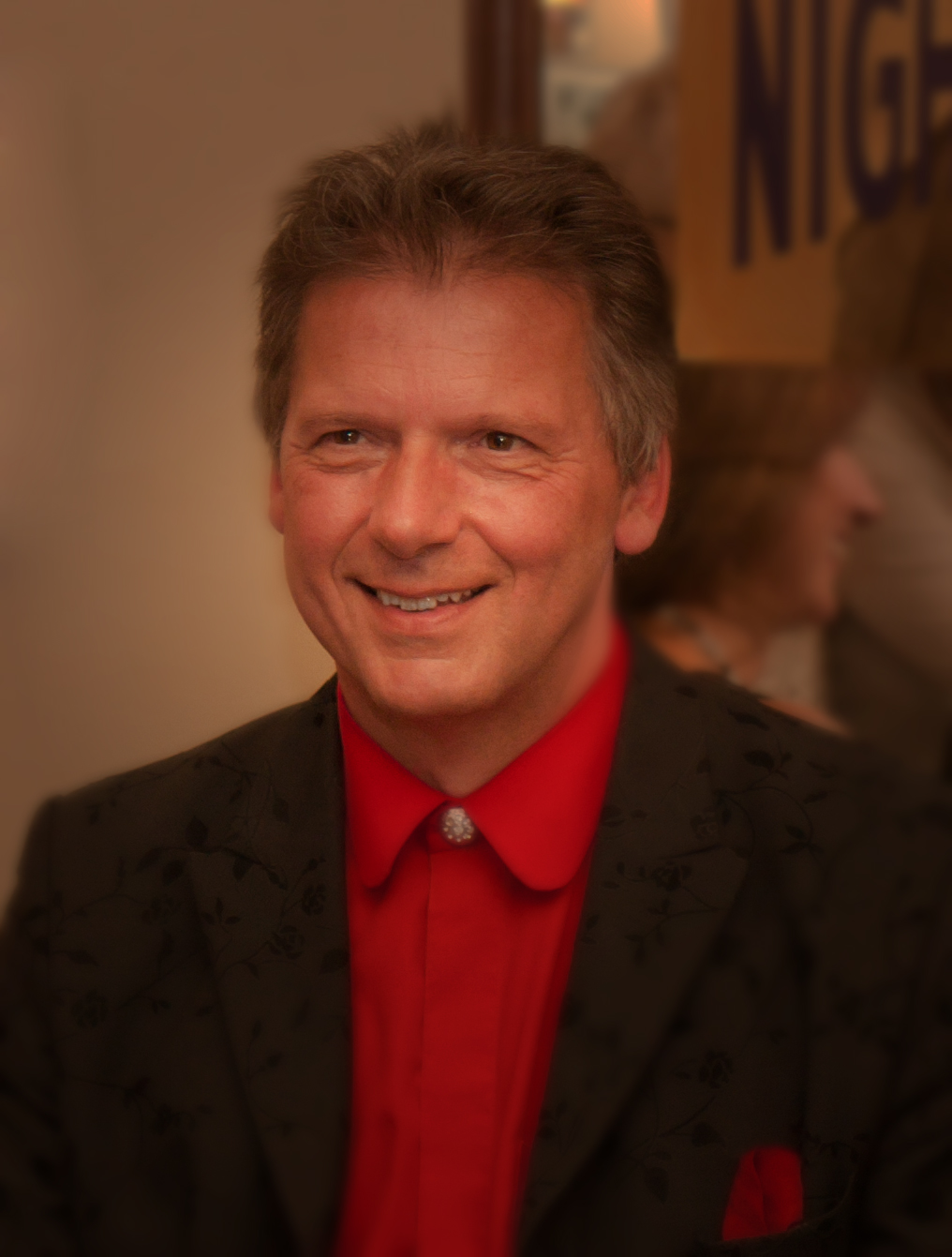 Barpianist Reinhard Wallner ist Komponist und Autor von Klavier Barmusik